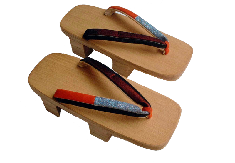 Geta, photo taken in Japan